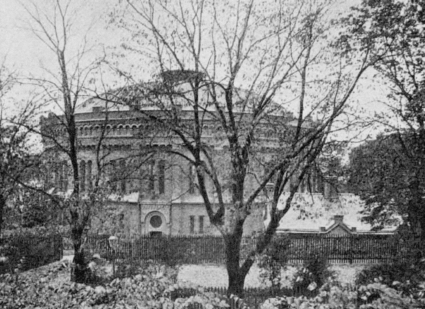 Gasklocka vid Sabbatsberg, Norrmalm 1885. Arkitekt P G Wermin genom Valfrid Karlson reviderade ursprungsritningar